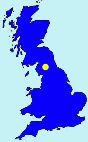 Kirby Thore. Lec'hiadur